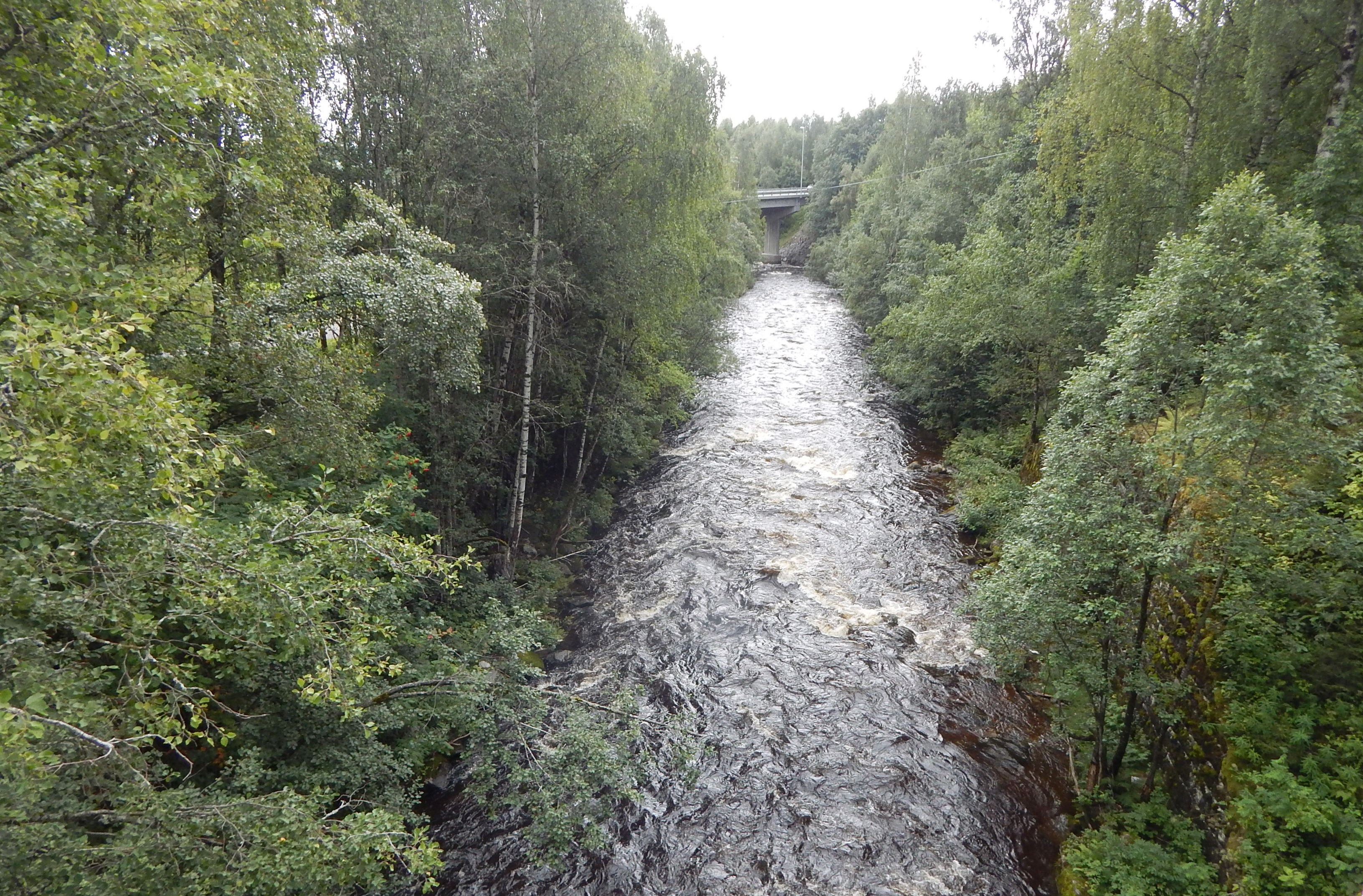 Stokkelva nedstrøms fra Stokke bru